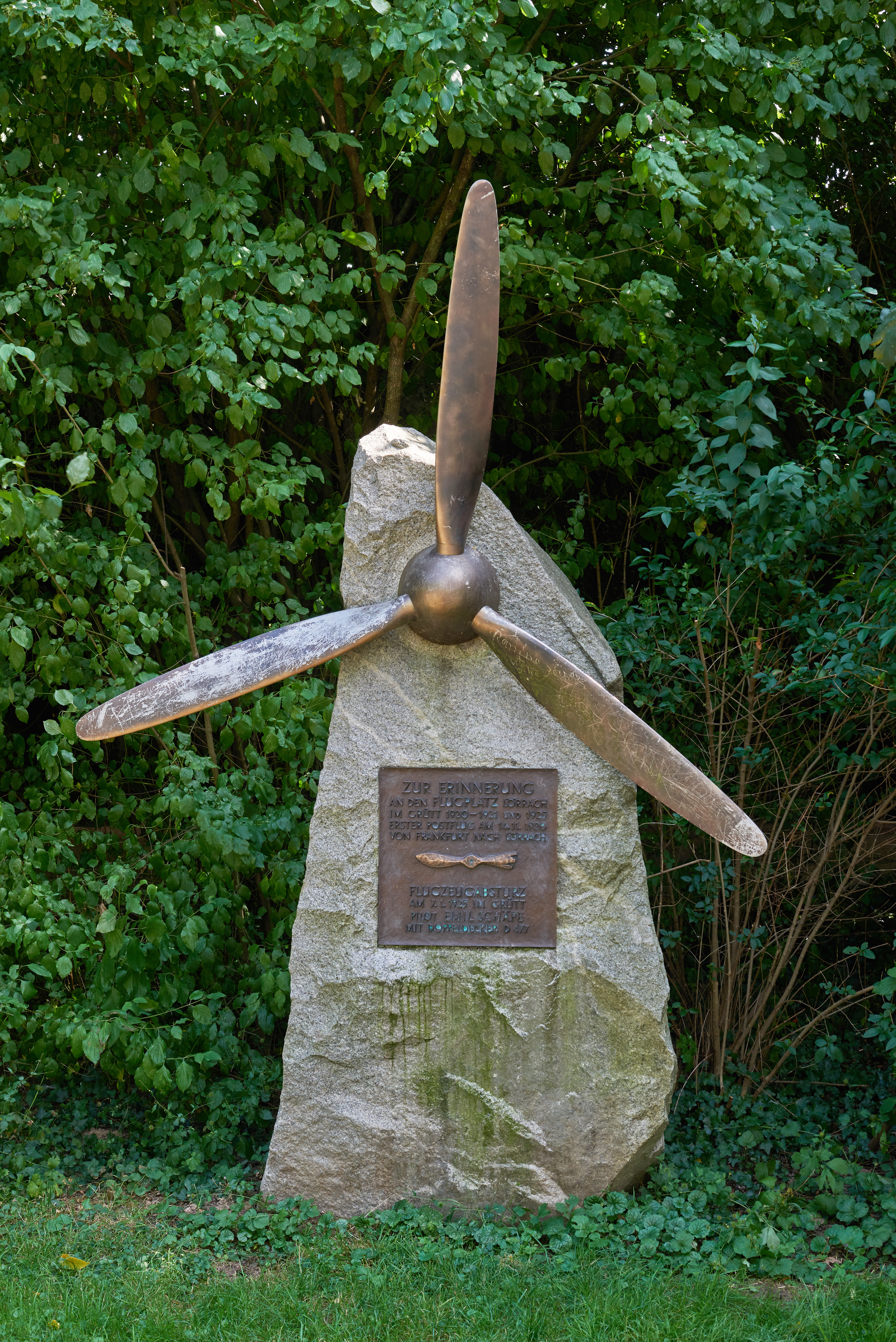 Fliegerdenkmal am Grüttpark